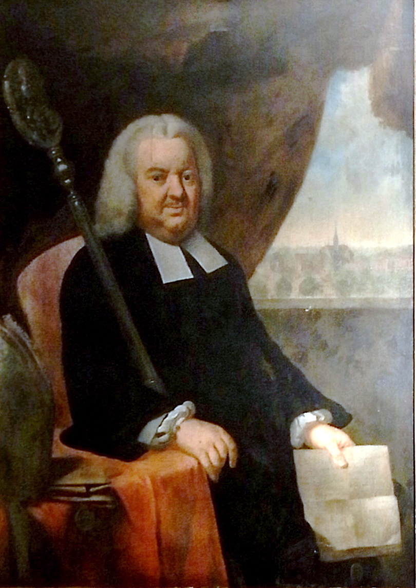 Georg Wilhelm Ebell (1696–1770), Abt in Loccum. Ölgemälde; in Privatbesitz